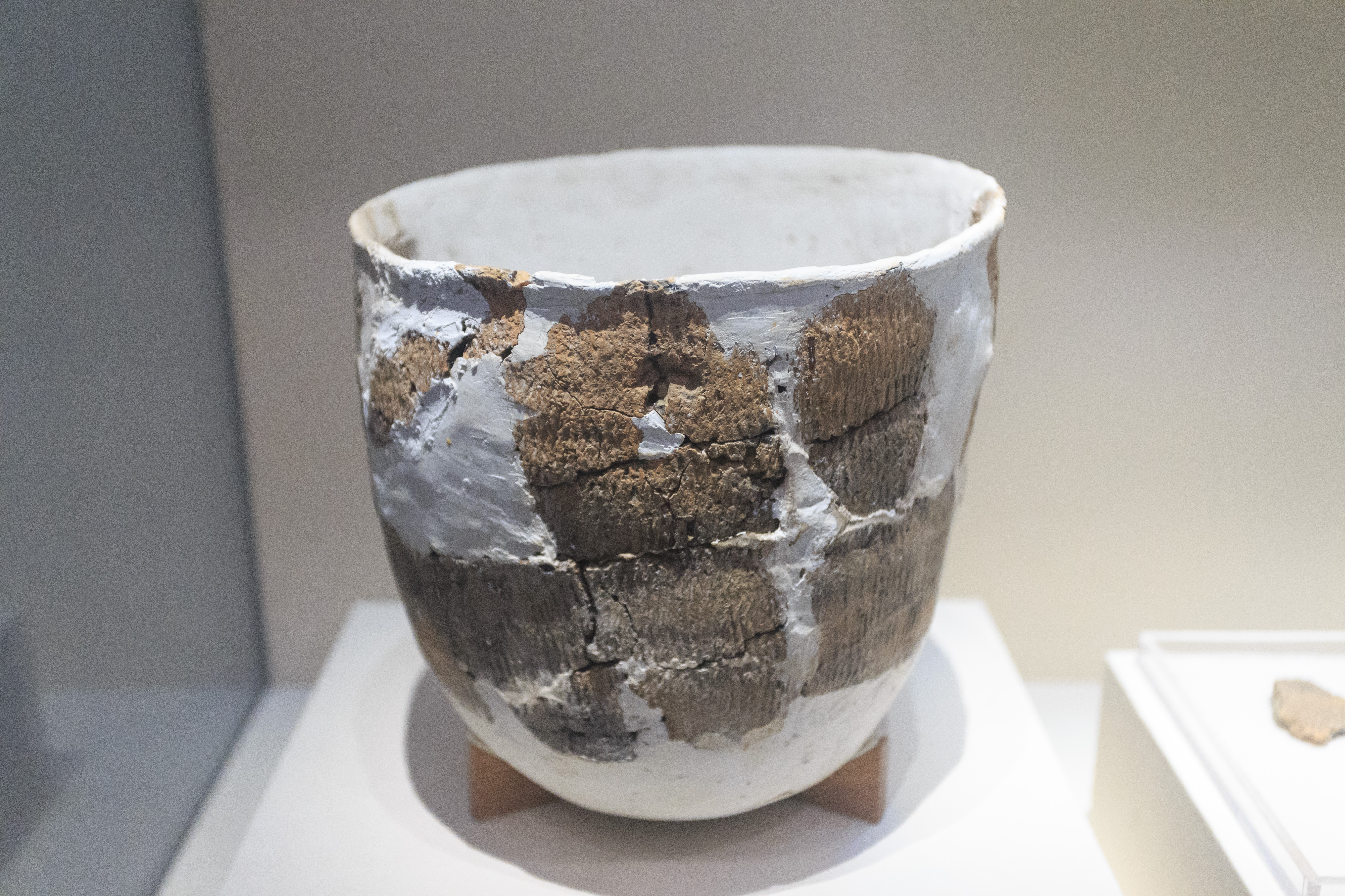 中国国家博物馆—— 陶罐，距今约1万年，1962年江西万年仙人洞出土